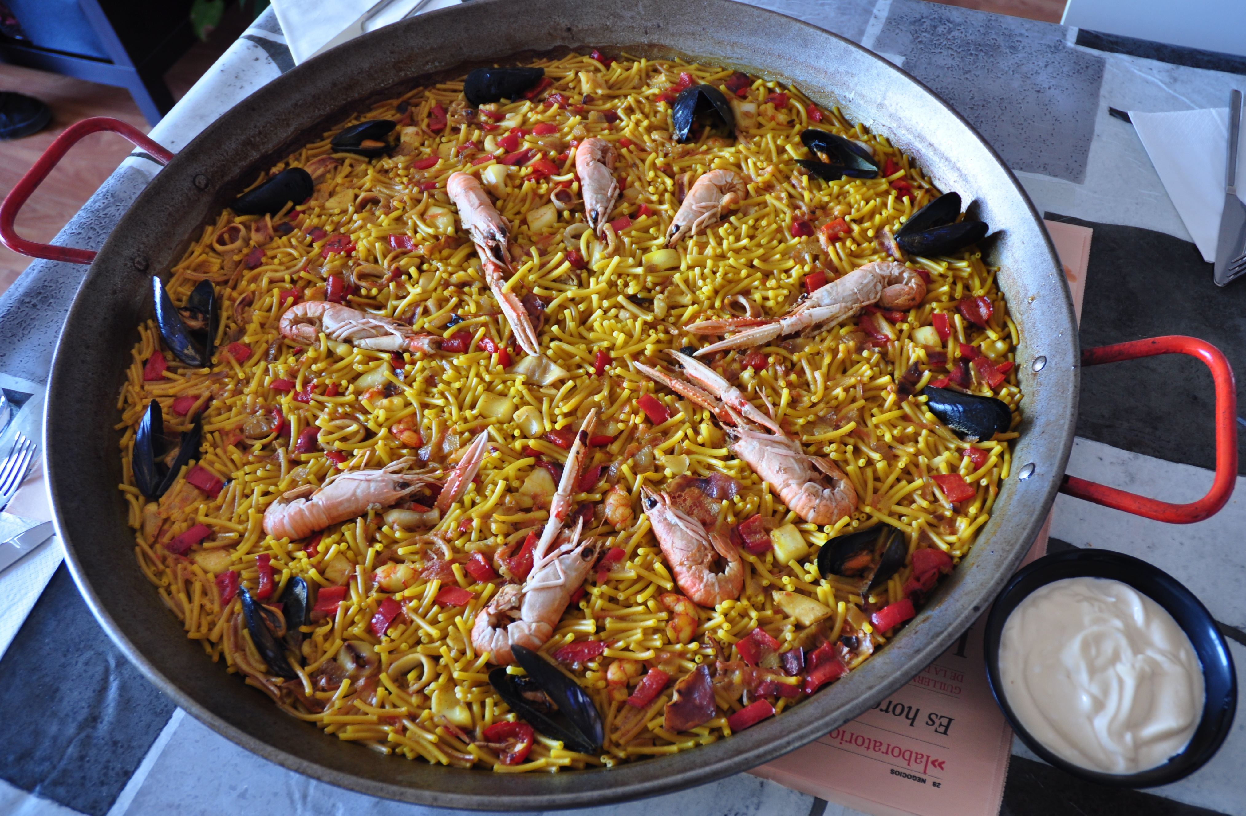 Una paella de fideuá, con alioli como complemento.